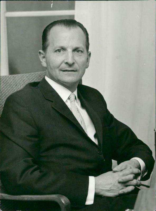 Ernst Michanek (1919–2007). Publicerat i SvD 1964-07-08.